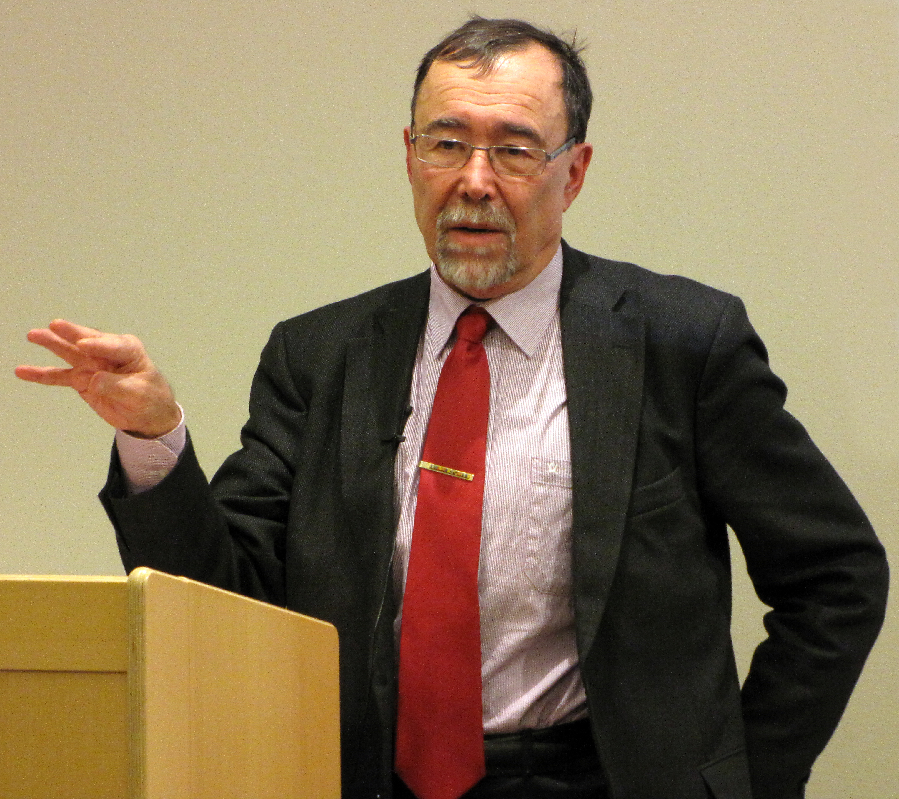 Historikern Kristian Gerner vid föreläsning på ArkivCentrum Örebro län.